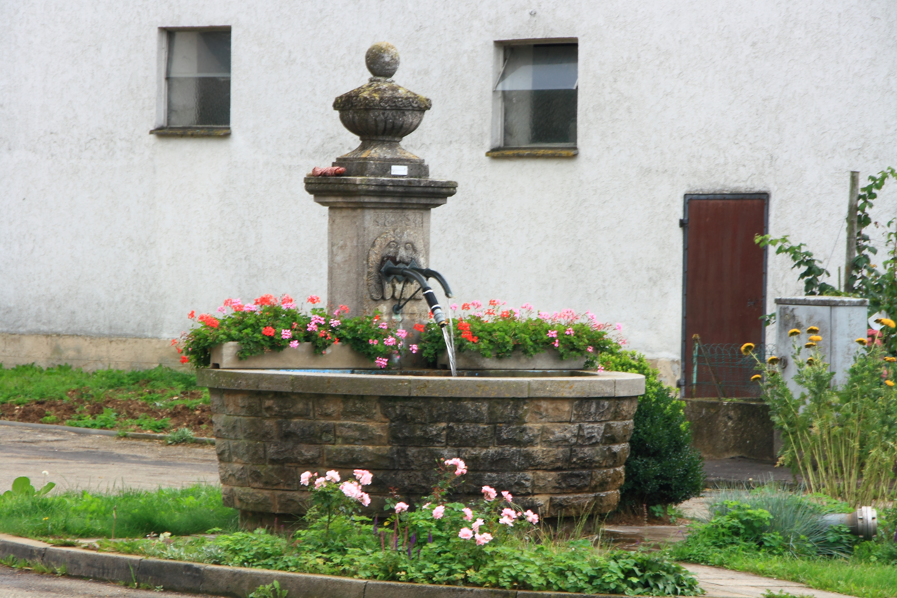 Brunnen im Weikersheimer Ortsteil Queckbronn.